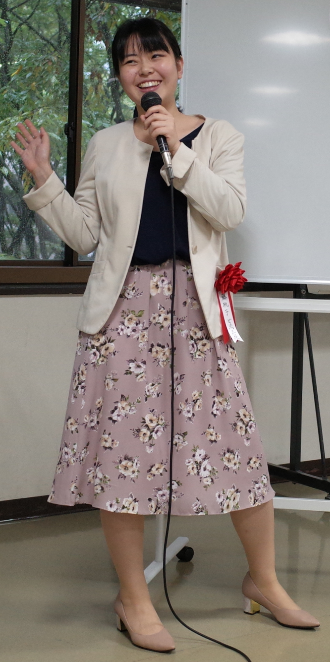 加藤桃子女流三段。2019年10月19日、棋士会みやぎ将棋フェスティバルにて。